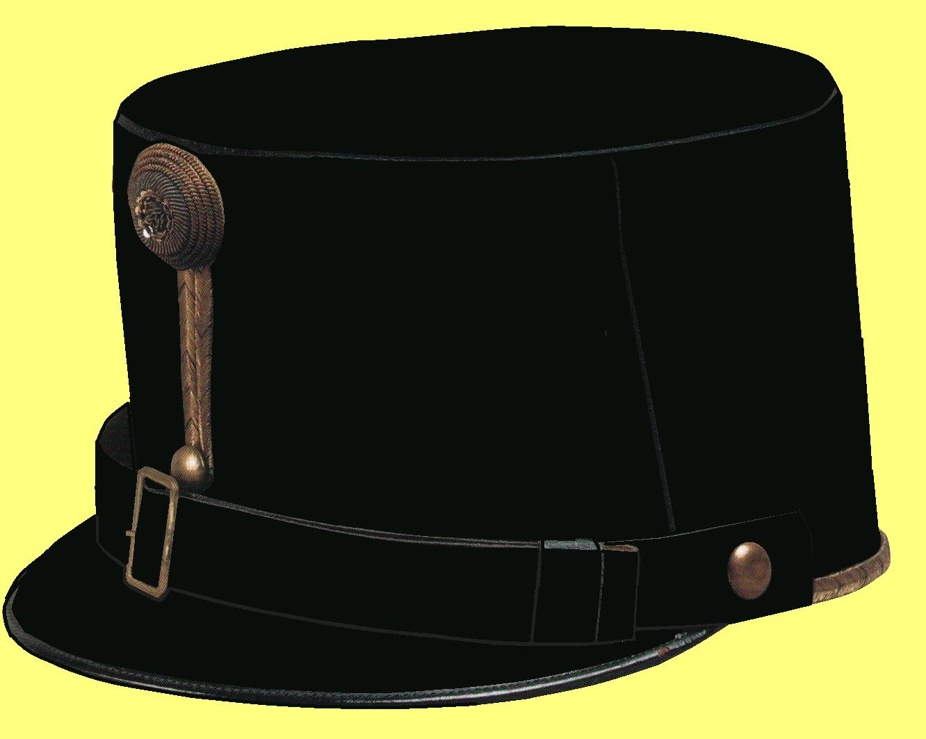 k.u.k. Infanterie Kappe für Fähnrich